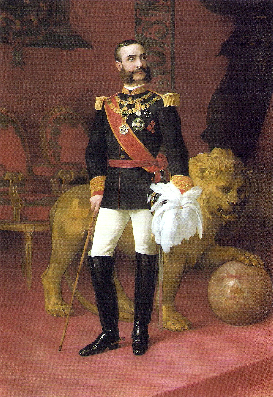 Retrato del rey Alfonso XII de España (1857-1885)